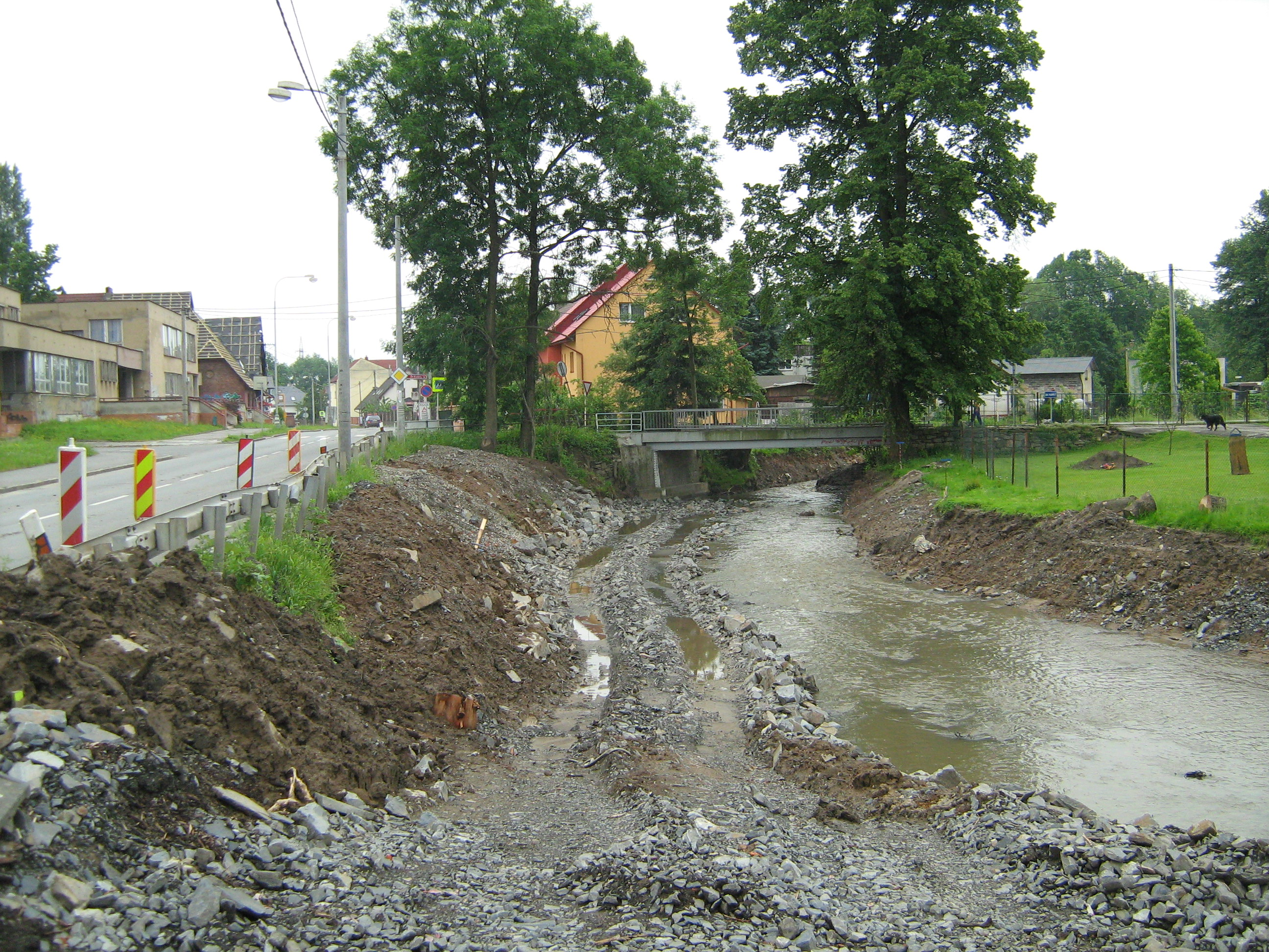 Zpevňování břehu Porubky, Ostrava-Svinov